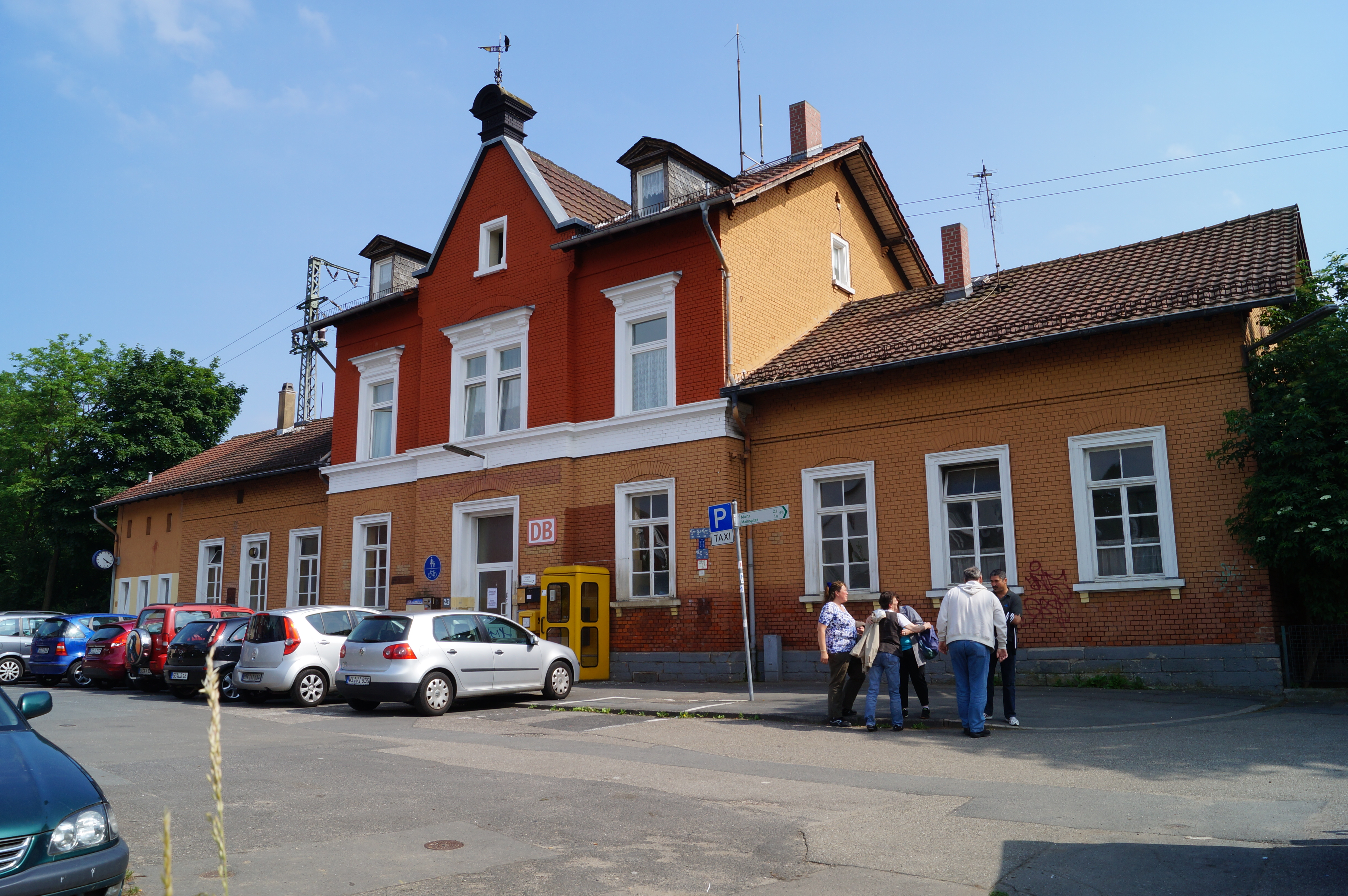 Das Bahnhofsgebäude des Bahnhofs Mainz-Gustavsburg